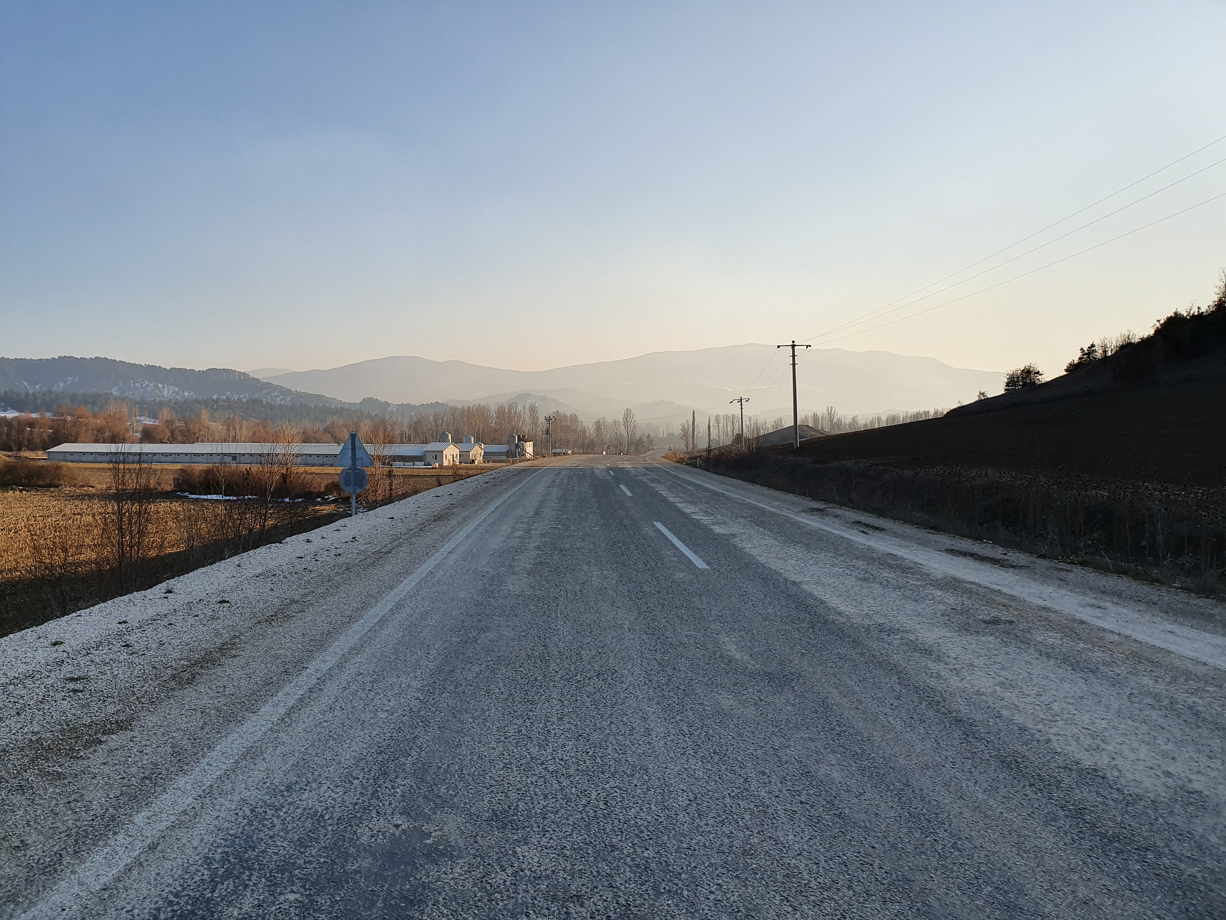 Mudurnu mevkinden Örencik köy yolu